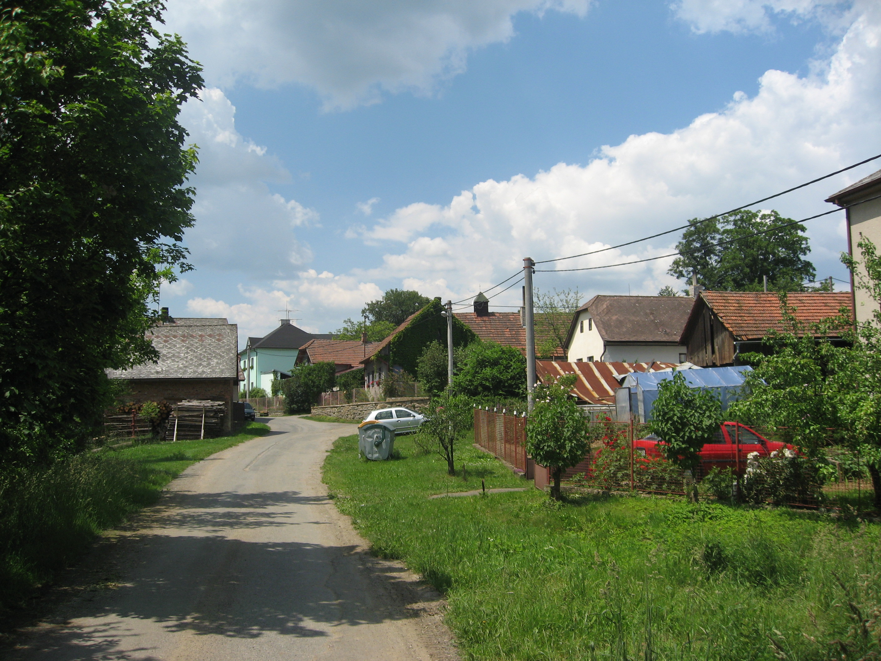 Úhořilka